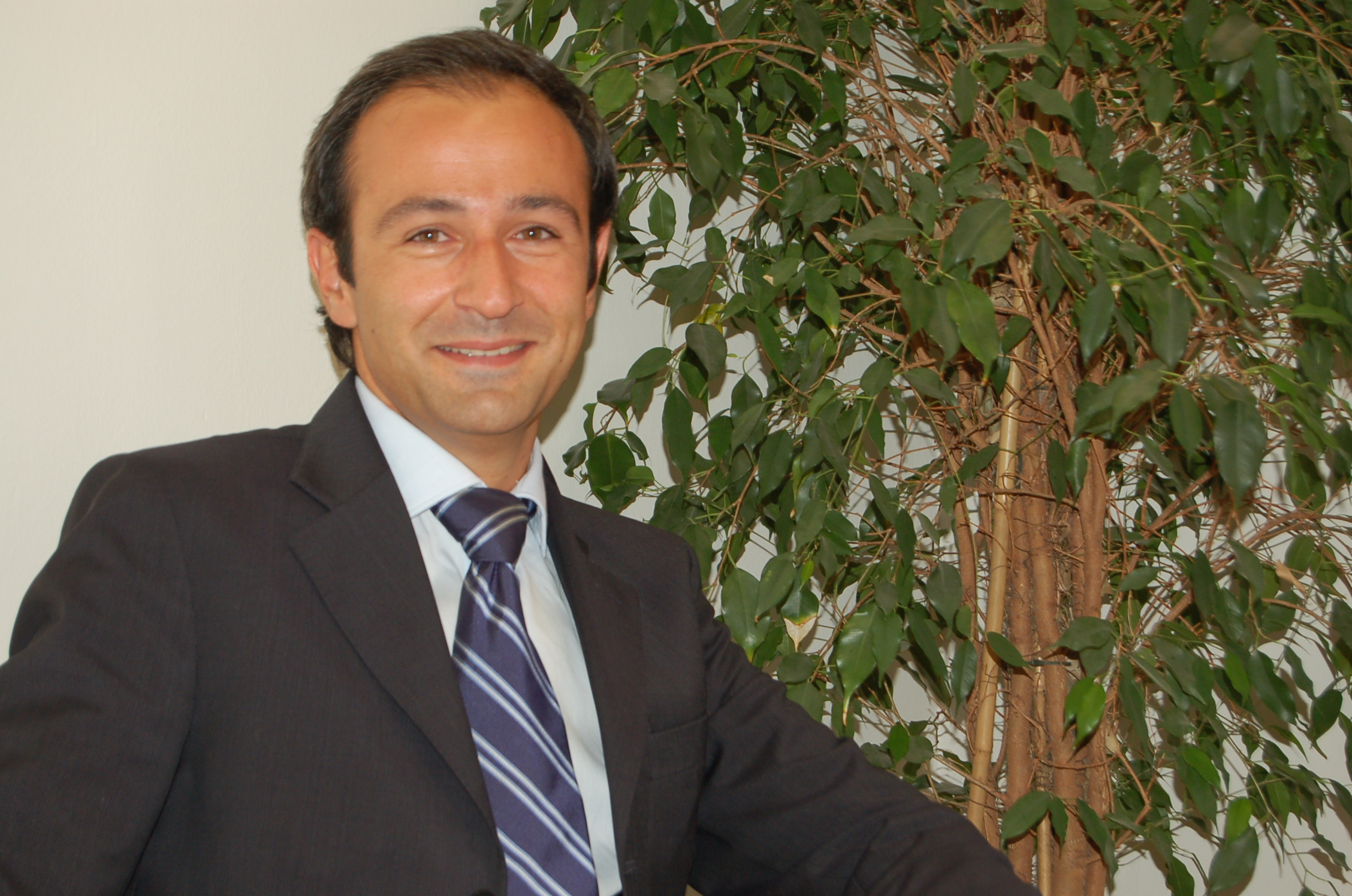 Fotografía alcalde de Cheste